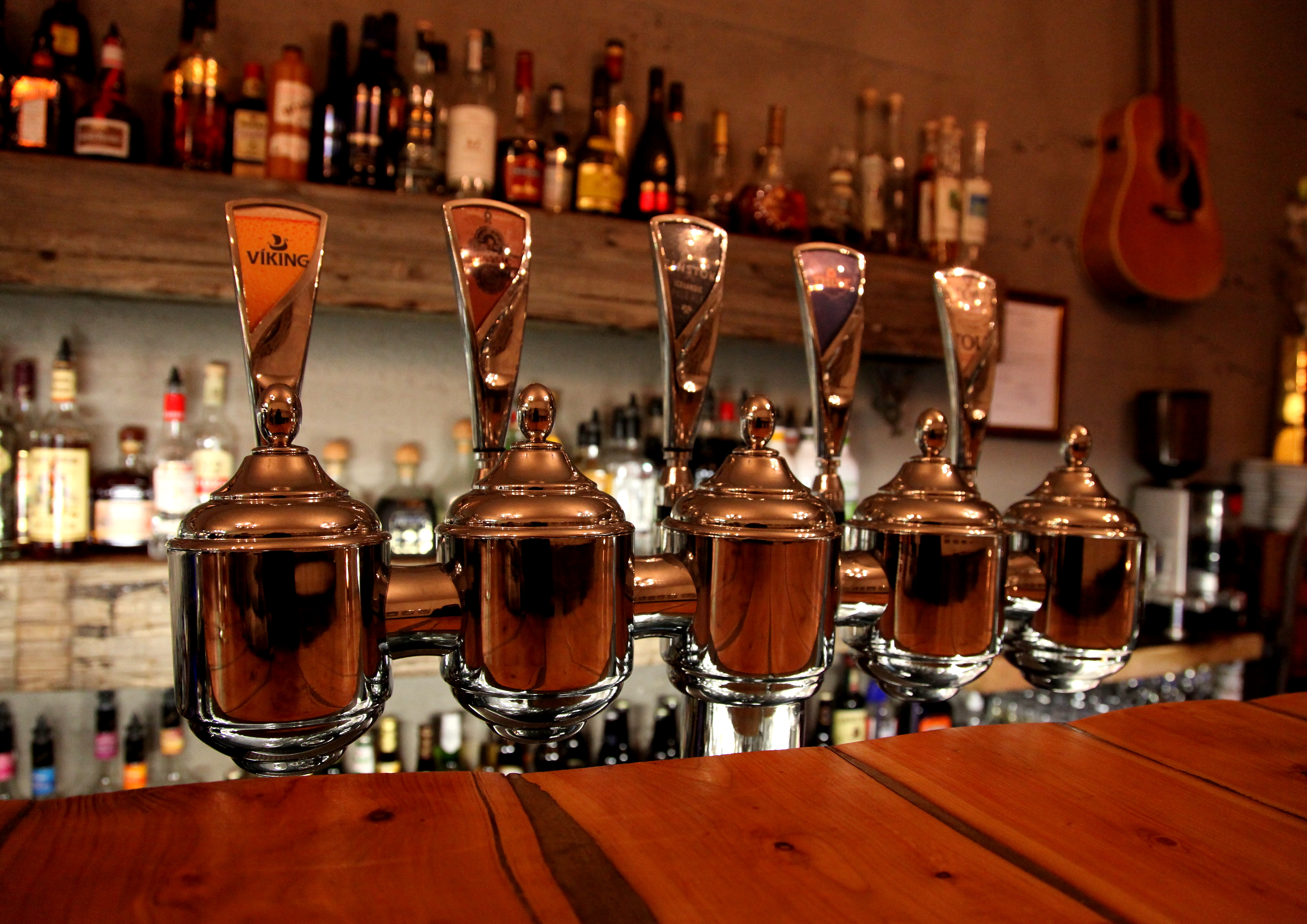 i'll have a viking please!